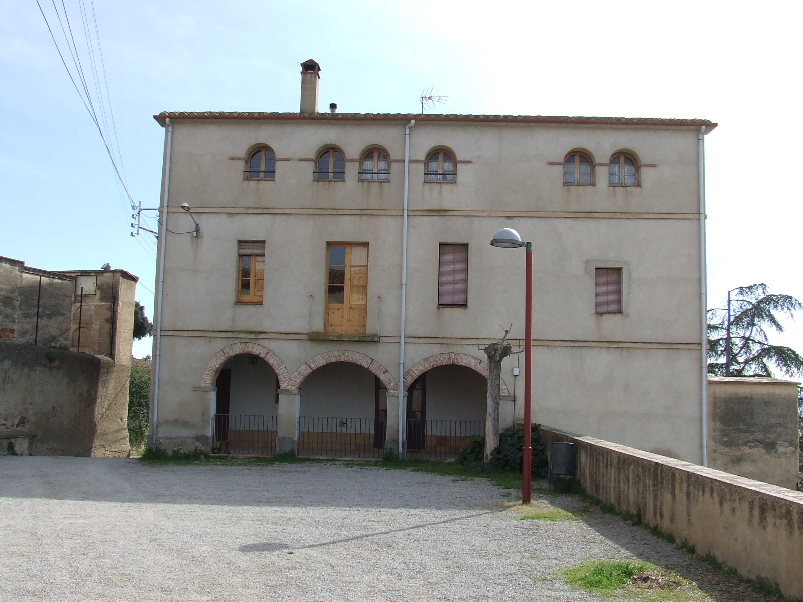 La Plaça de l'Església (Bigues, Bigues i Riells, Vallès Oriental).